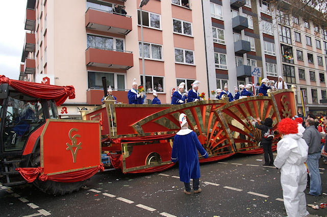 GCV - Rosenmontag - Komiteewagen